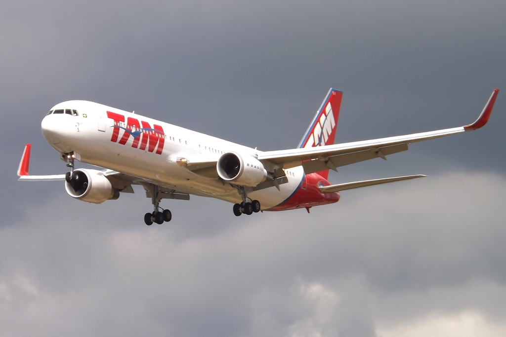 PT-MSX Boeing 767 TAM